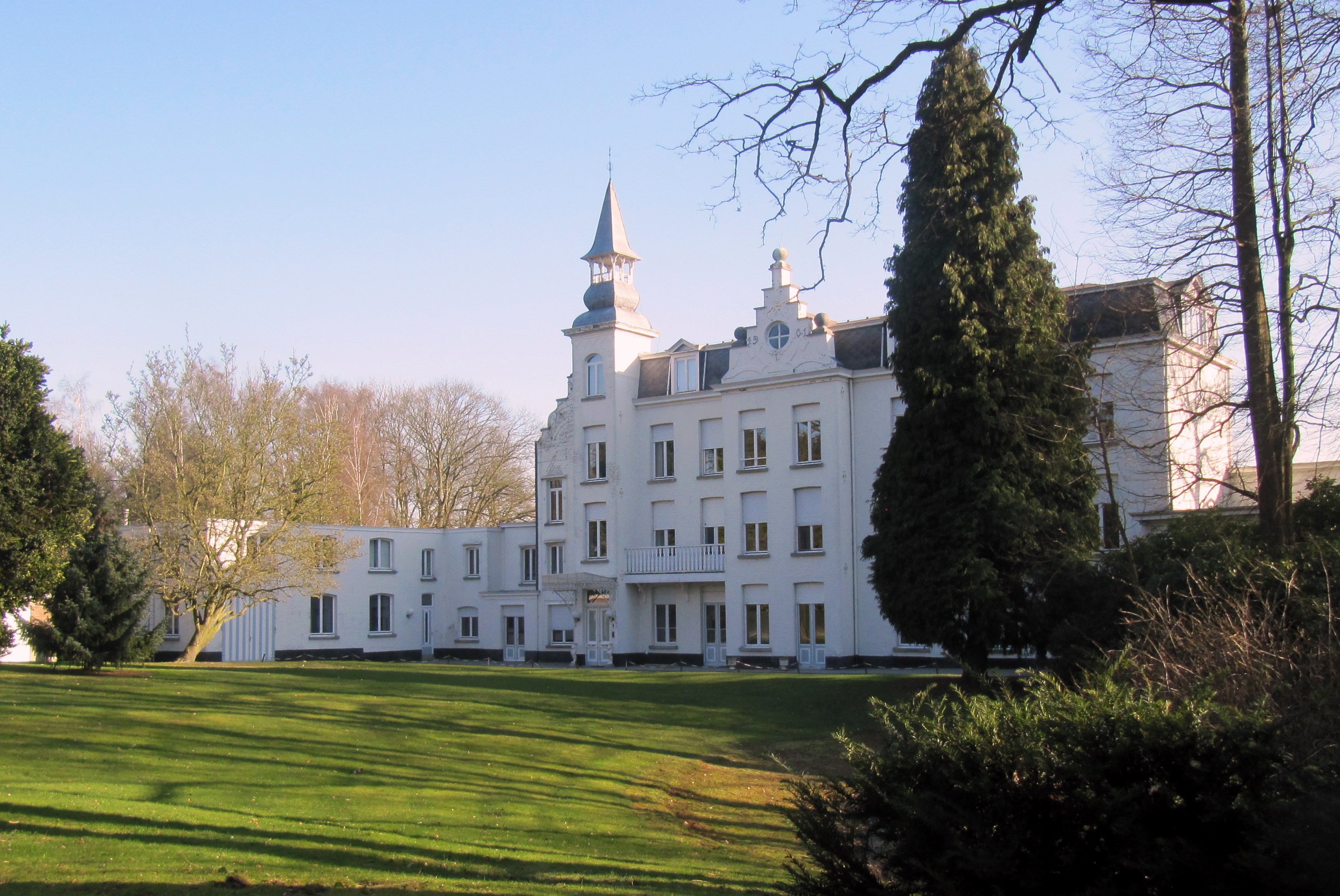 Boechout (prov. Antwerpen, België). Landhuis Vijverhof, Alexander Franckstraat nr.75.